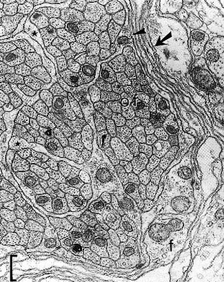 Imagen del microscopio electrónico mostrando las láminas de glía envolvente (flecha) rodeando grupos de fibras olfativas (Of) en la capa de nervios olfativos del erizo (Erinaceus europaeus). Escala = 1 micra.